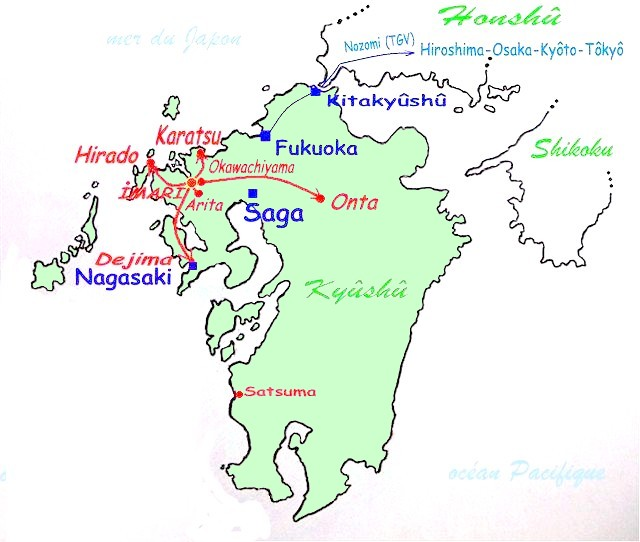 Map of Kyushu Island, permission by Georges Le Gars . Visite de sites céramiques à partir de la ville d'Imari